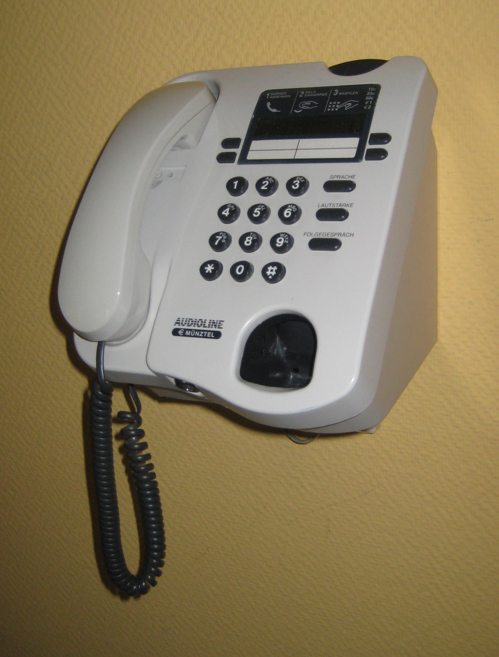 Münztelefon Audioline